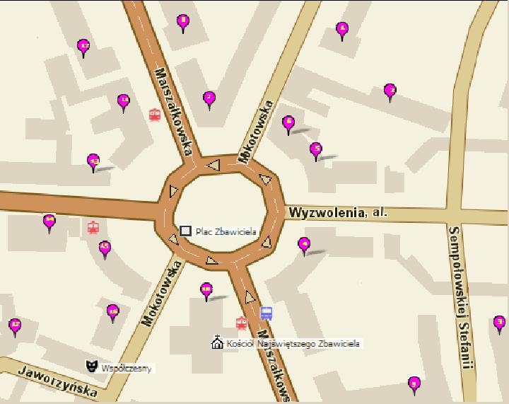 Planzeichnung des Plac Zbawiciela (Erlöser-Platz) in der polnischen Hauptstadt Warschau